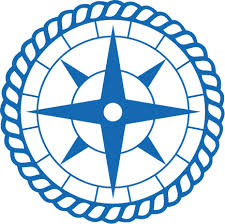 Ružica kompasu